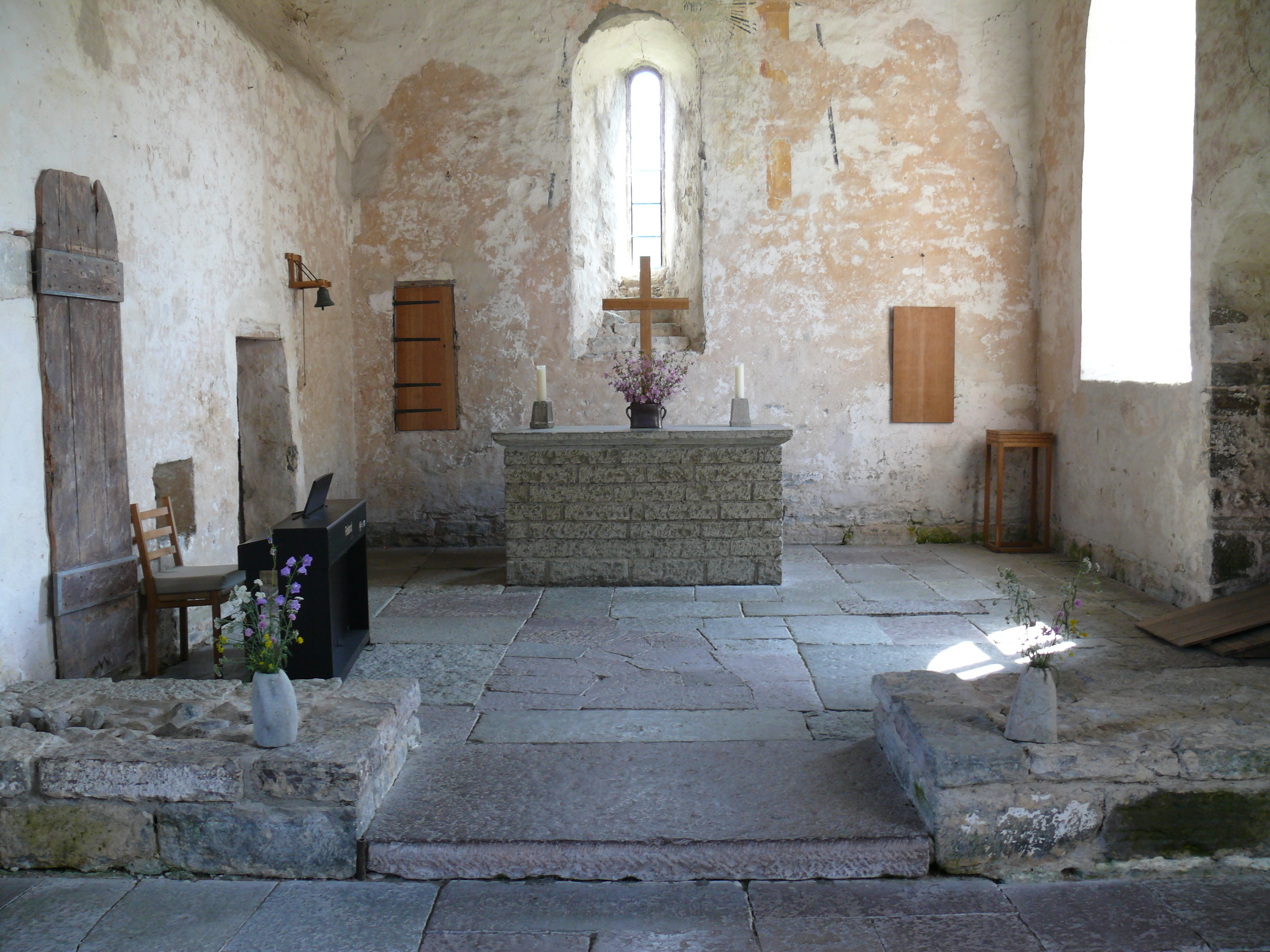 Källa ödekyrka, Öland